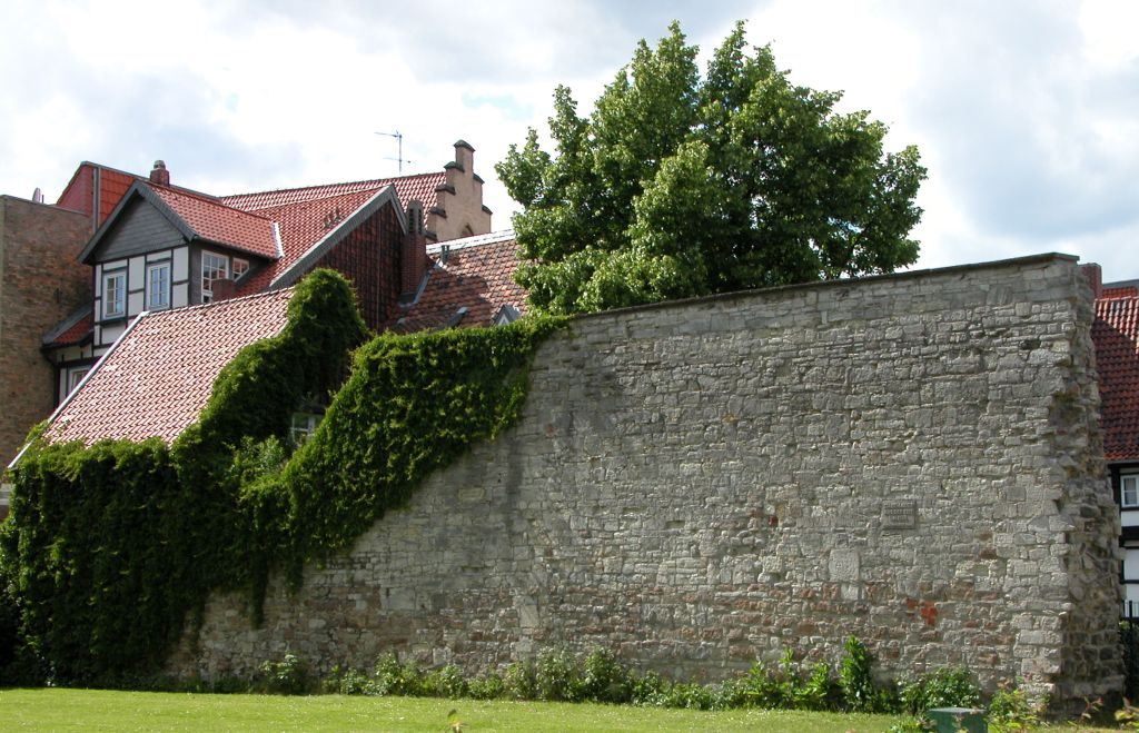 Braunschweig: Letzter Rest der Mittelalter